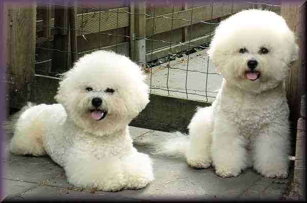 Dancer und Sahra sind vorzügliche Vertreter ihrer Rasse. Sie haben ein super lieben Charakter. Beide stammen aus der Bichon frise Zucht der Monika Sausen, Honey Dreams